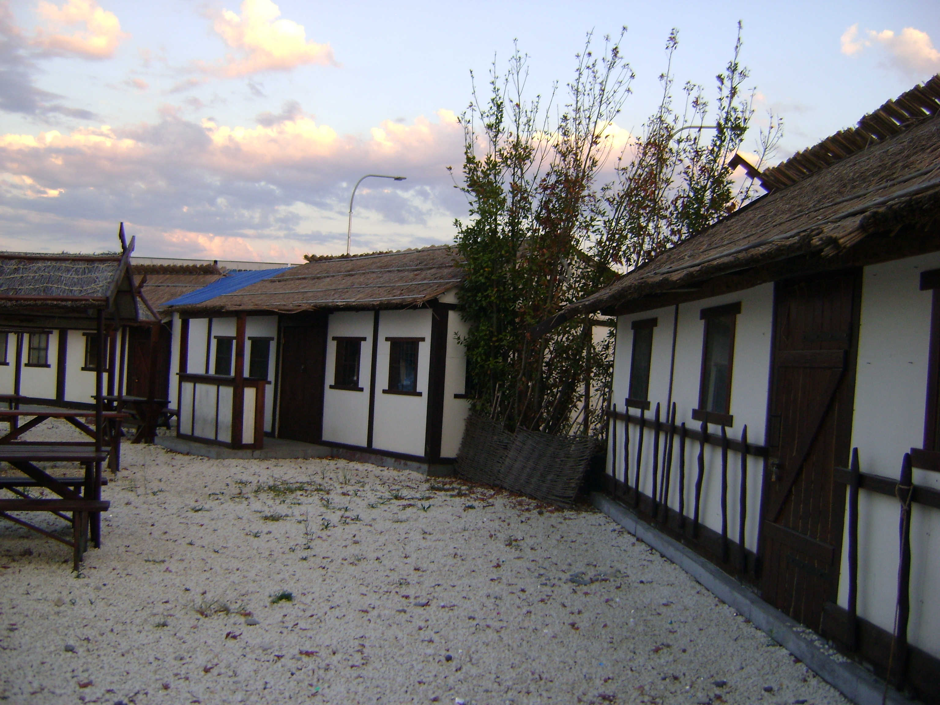 Сочі.